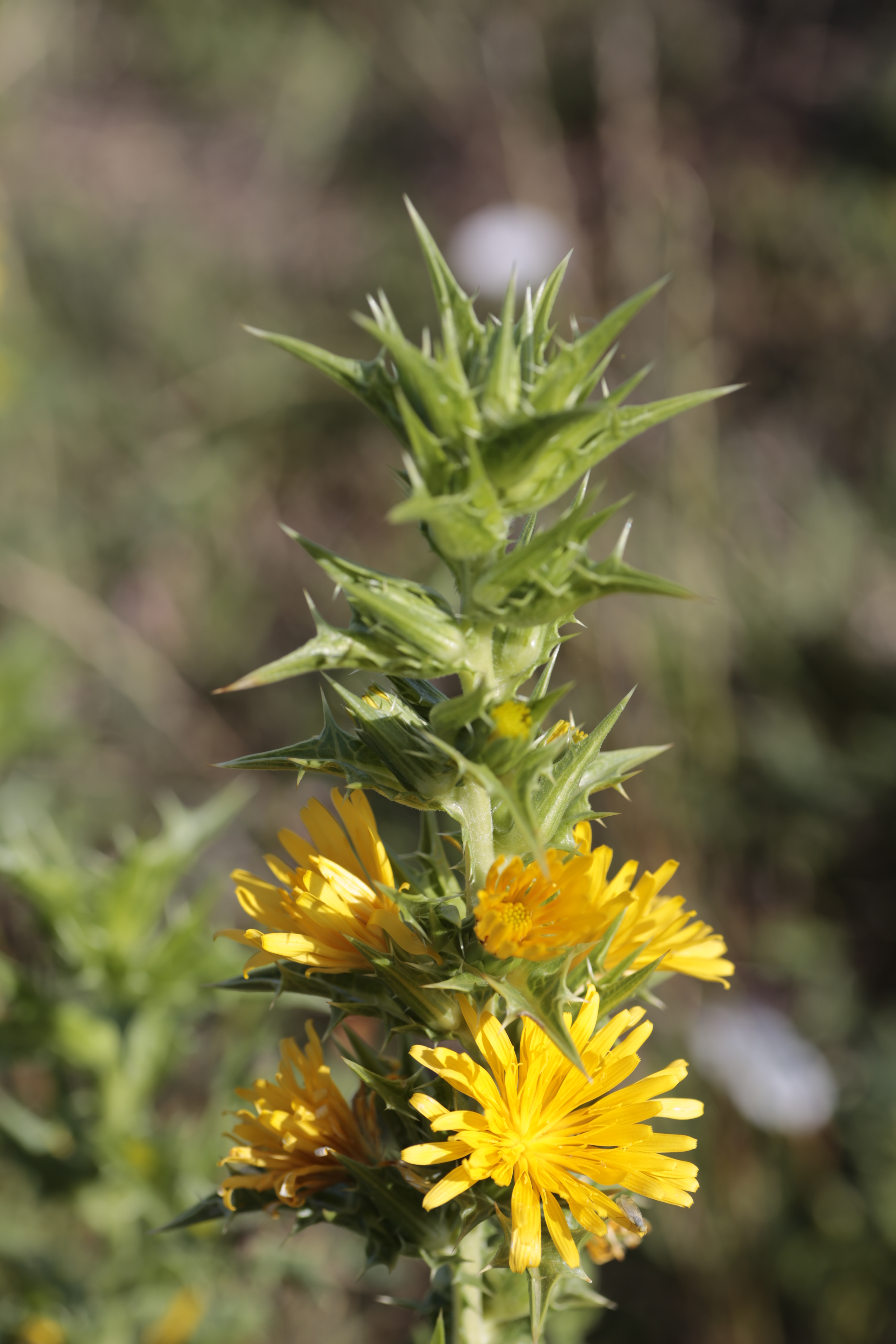 Scolymus hispanicus; Cardogna comune